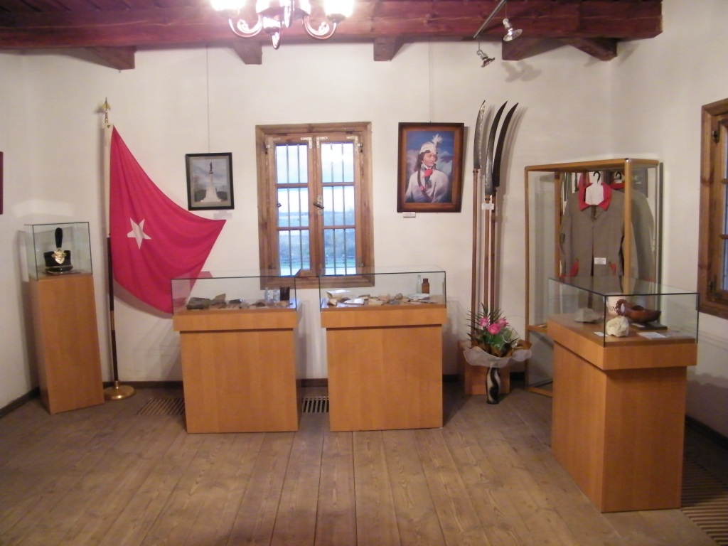 Беларуская (тарашкевіца): Косаўскі палацава-паркавы ансамбль: мэмарыяльны музэй-сядзіба Т. Касьцюшкі Унутры. г. Косава This is a photo of Belarusian heritage monument. Reference number: 111Г000305 ( WLM)